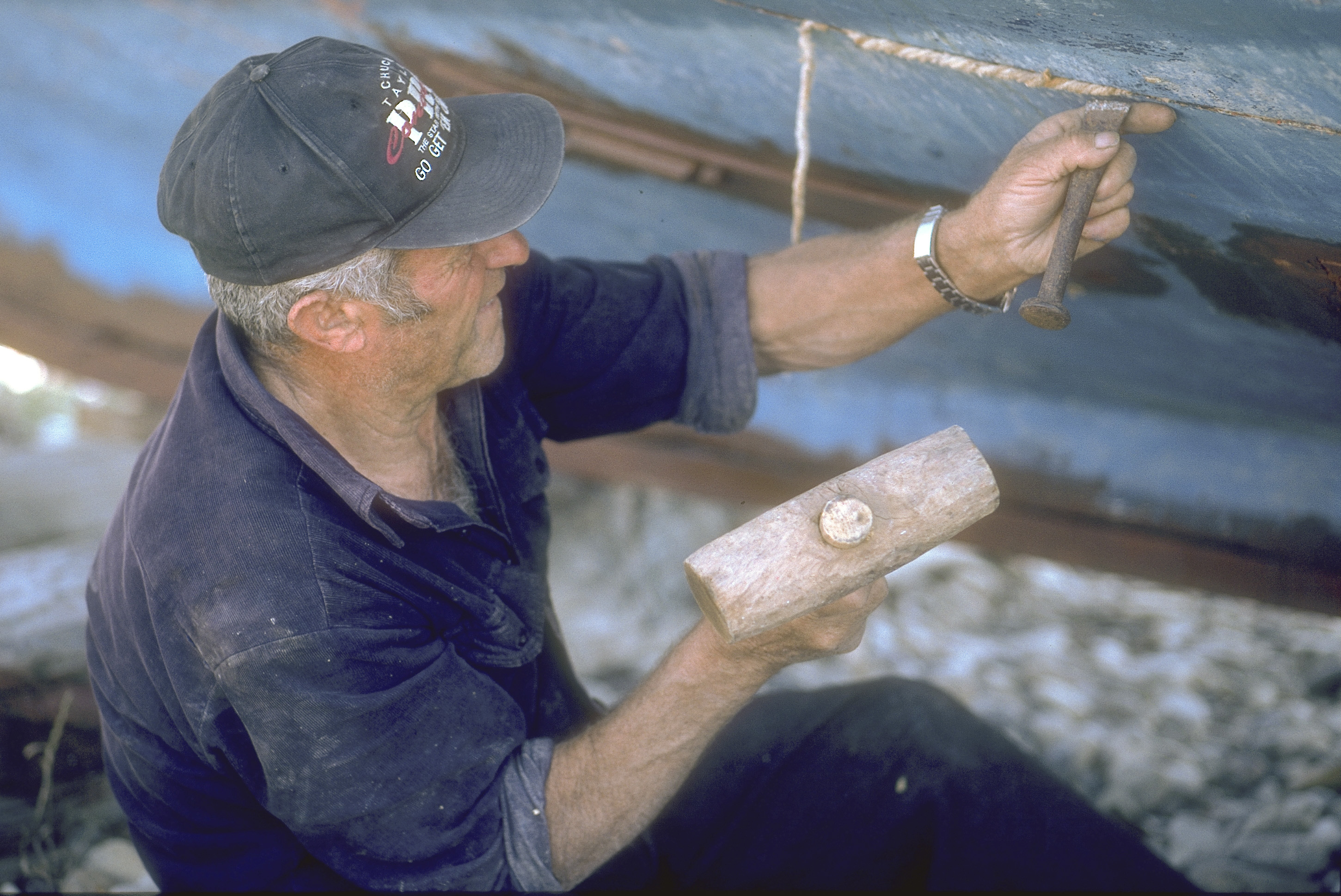 Vissert breeuwt zijn boot